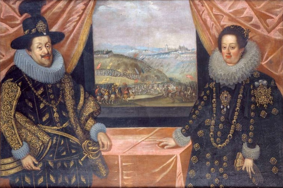 Ölgemälde von Kaiser Ferdinand II. von Habsburg und seiner zweiten Gemahlin Eleonore von Mantua.